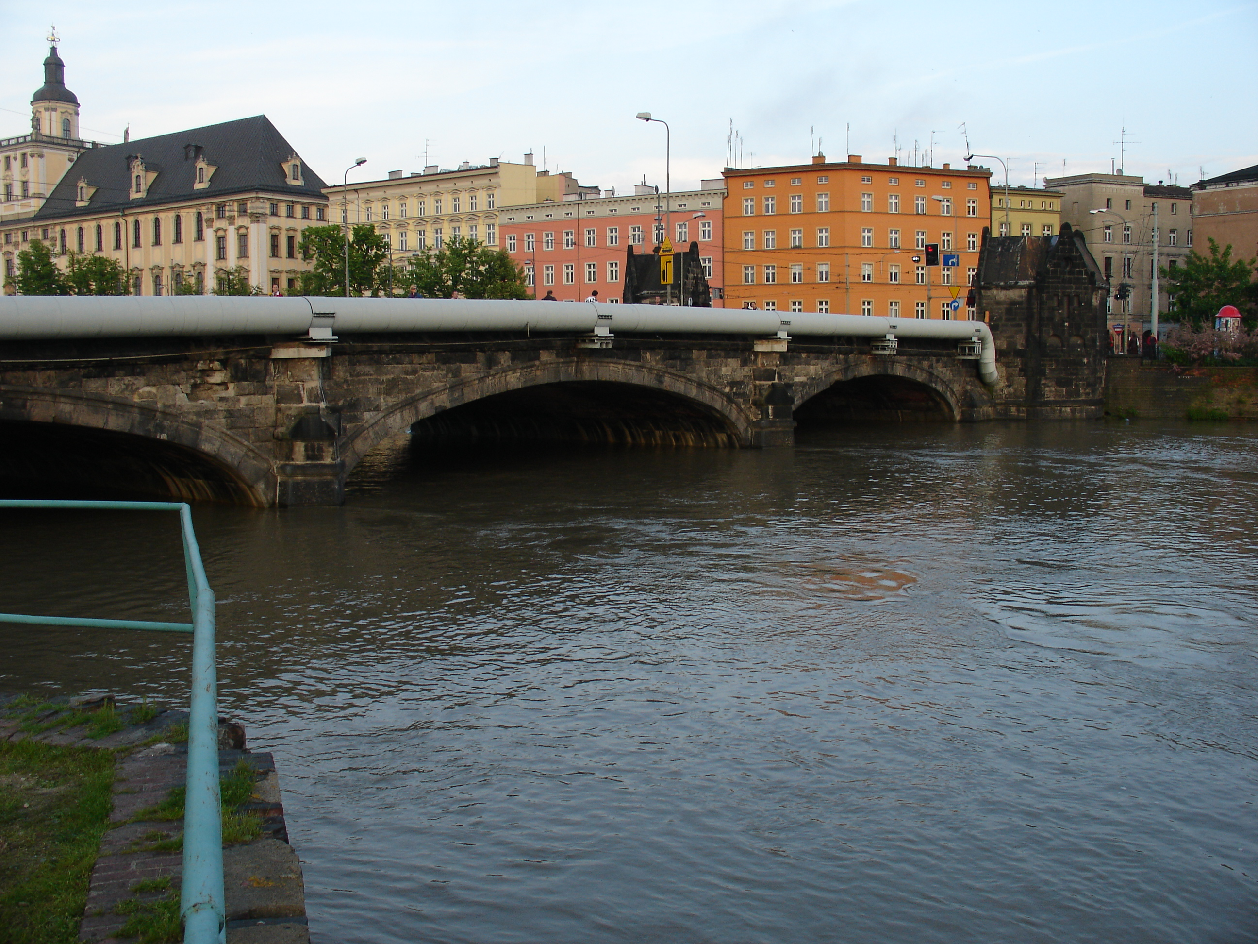 Odra pod mostem Pomorskim we Wrocławiu, piątek 21-05-2010, wieczór